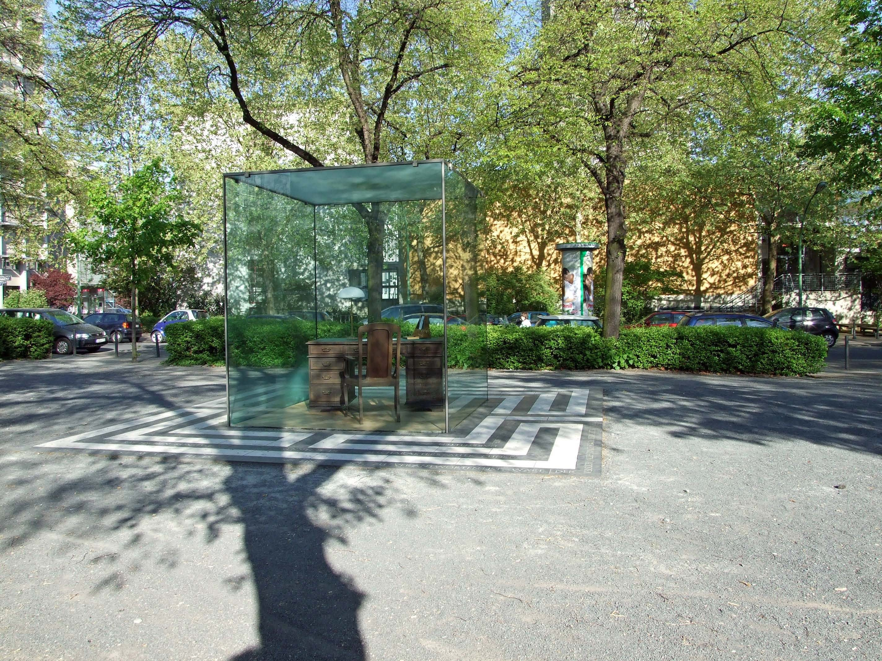 Das „Adorno-Denkmal“, 2007 auf dem „Theodor-W.-Adorno-Platz“ nur eine Parallelstraße (westlich) vom Institut für Sozialforschung entfernt.